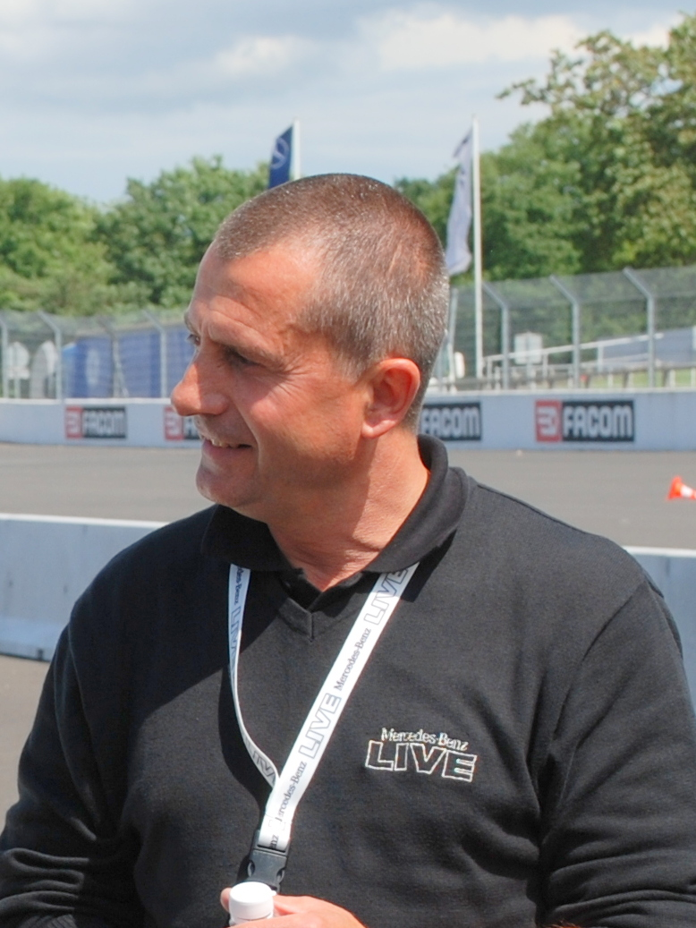 Yannick Dalmas au Mercedes Benz Live à Monthléry